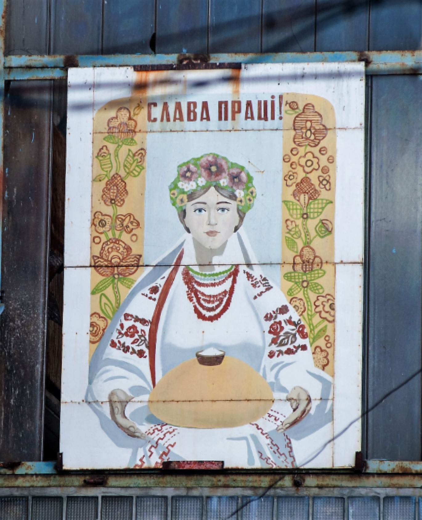 Плакат СРСР.